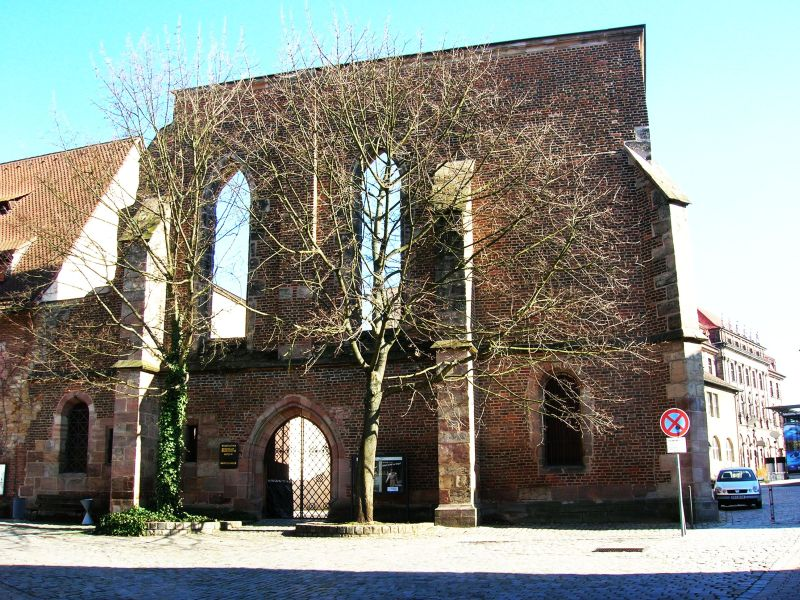 Katharinenruine, Nuremberg, Germany